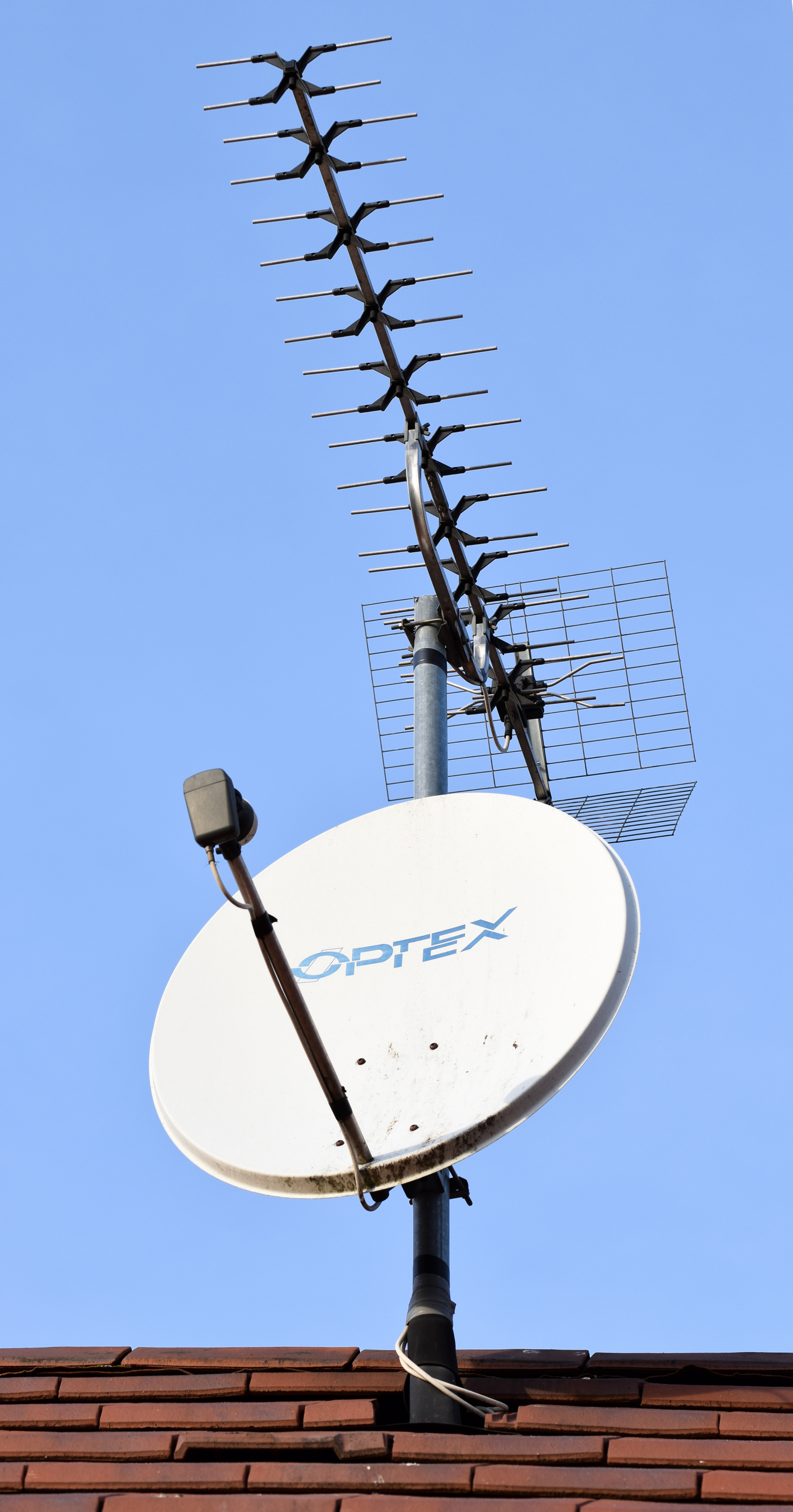 Antenne parabolique